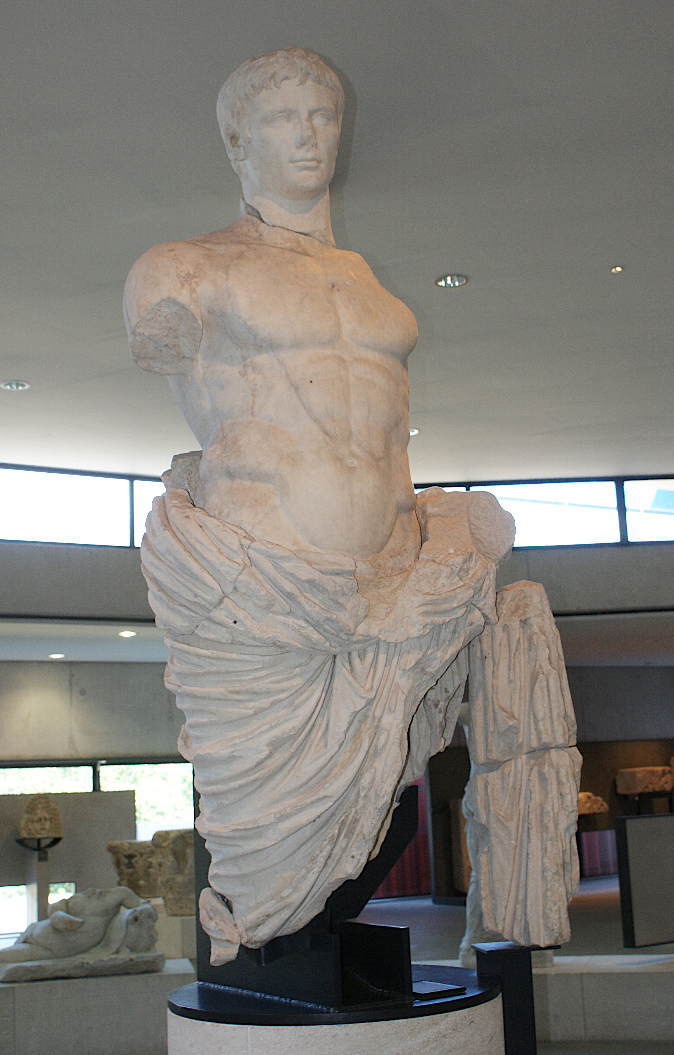 Tronc monumental d'Auguste découvert lors des fouilles du théâtre antique d'Arles. Le torse et la tête sont découverts séparément, respectivement en 1750 et 1834. Proviendrait de la décoration du postscaenium, au dessus de la porte royale. Exposé au Musée de l'Arles Antique. FAN 92.00.215/2679